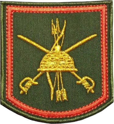 Нарукавный знак 74-й ОМСБр (Юрга)